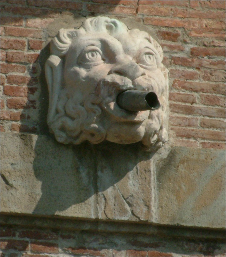 Wasserspeier, der Maskaronen ähnelt Fotografiert in Pisa. Rechte übertragen an Anton, 2006